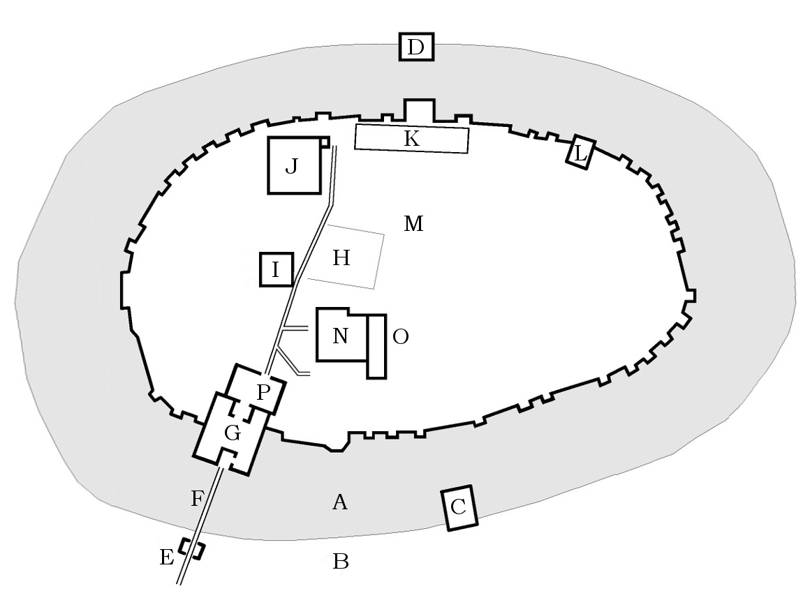 アレッポ城の概要図 Plan of Aleppo Citadel A. 傾斜面 (Glacis 〈Slope〉) B. 堀 (Molt, Ditch) C. 南の防衛塔 (South Advance Tower, South Bastion) D. 北の防衛塔 (North Advance Tower, North Bastion) E. 外門 (Outer Gateway, Bridge Tower) F. 橋 (Bridge) G. 中門 (Inner Gateway, Entrance Complex) H. ハダドの神殿 (Temple of the Weather God) I. アブラハムのモスク (Mosque of Abraham) J. 城塞の大モスク (Great Mosque of Citadel, Big Moszue) K. 博物館（イブラーヒーム・パシャの兵舎 〈Barracks of Ibrahim Pasha〉） L. オスマン時代の風車（Ottoman Mill） M. 現代の円形劇場 (Modern Theater) N. アイユーブ朝の宮殿 (Ayyubid Palace) O. 宮殿の浴場 (Palace Hamman) P. 東ローマ帝国時代の貯水槽 (Byzantine cistern)